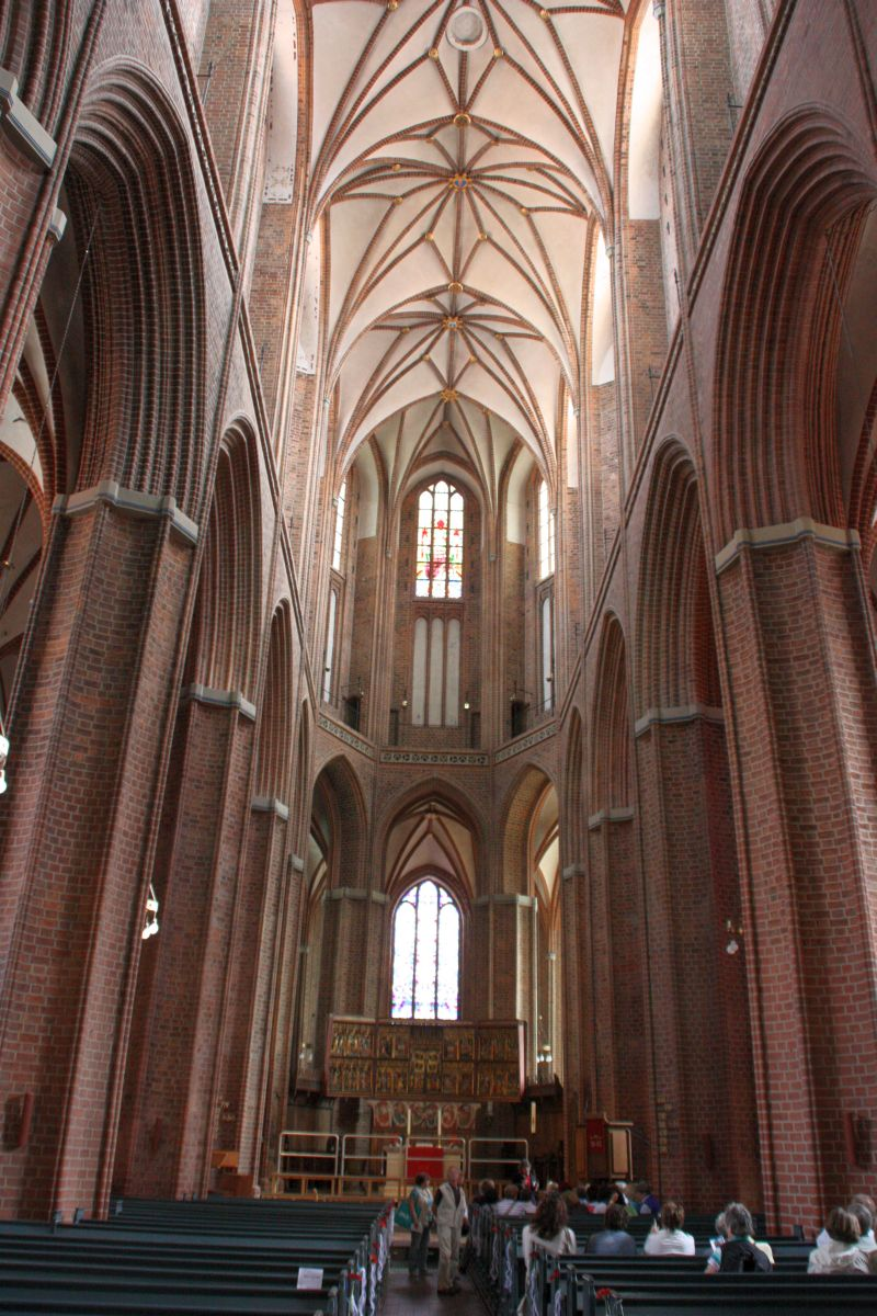 In der Nikolaikirche von Lüneburg